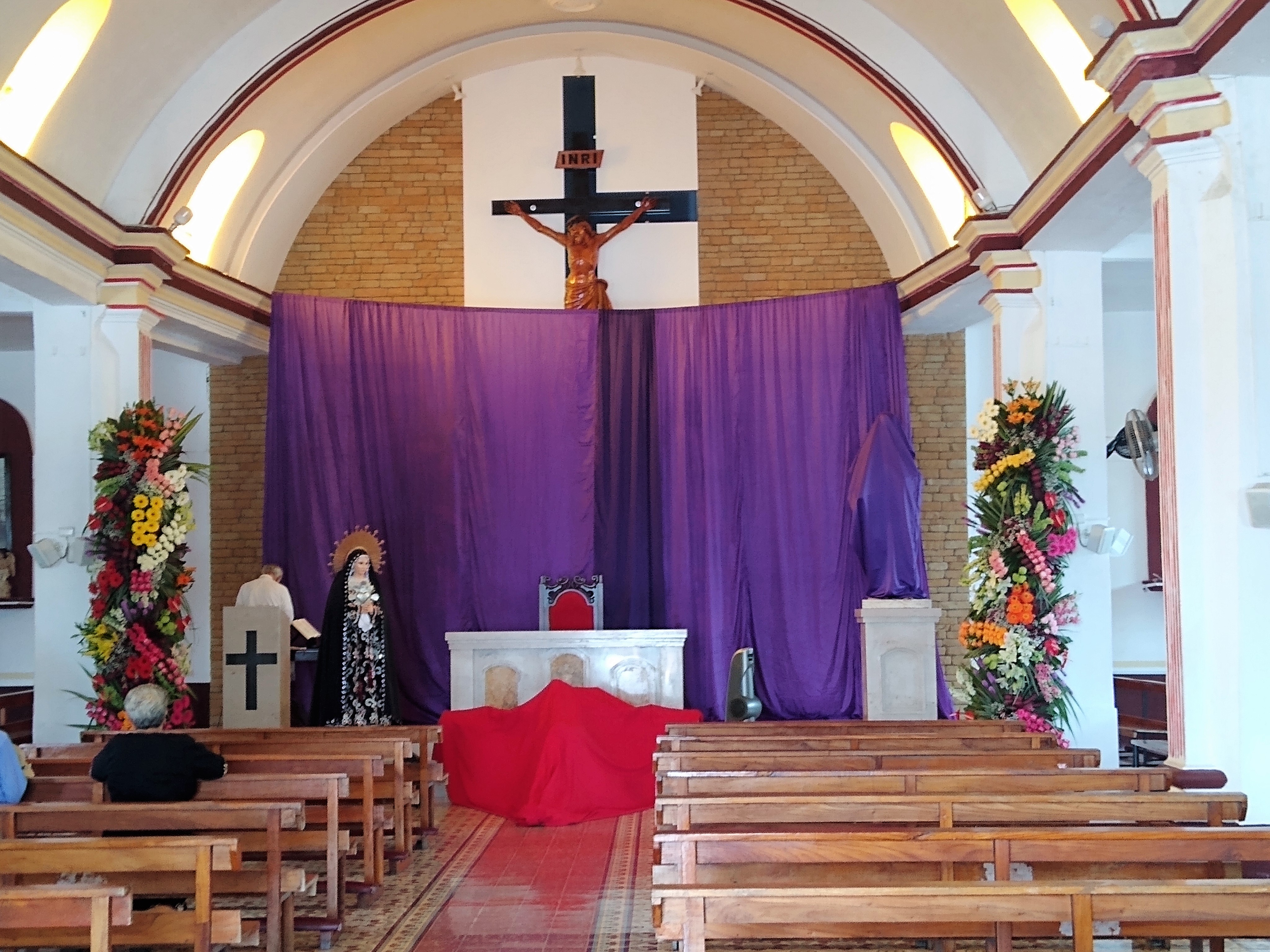 Viernes santo a puerta cerrada en Parroquia del Espinal, Orizaba